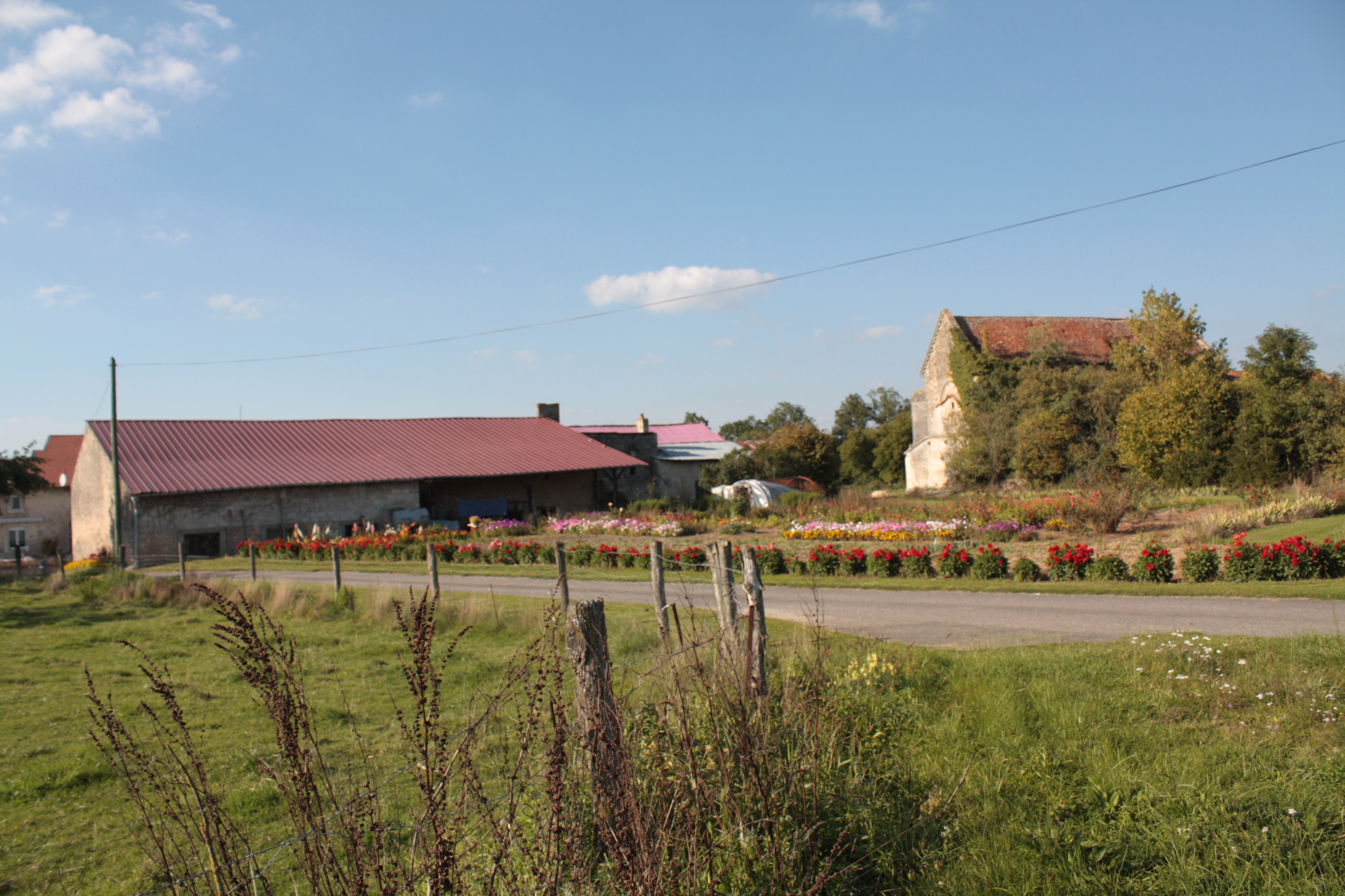 Ferme de Libdeau, ancienne commanderie templière vue de l'ancienne voie romaine Lyon - Trèves, actuelle RN 411.